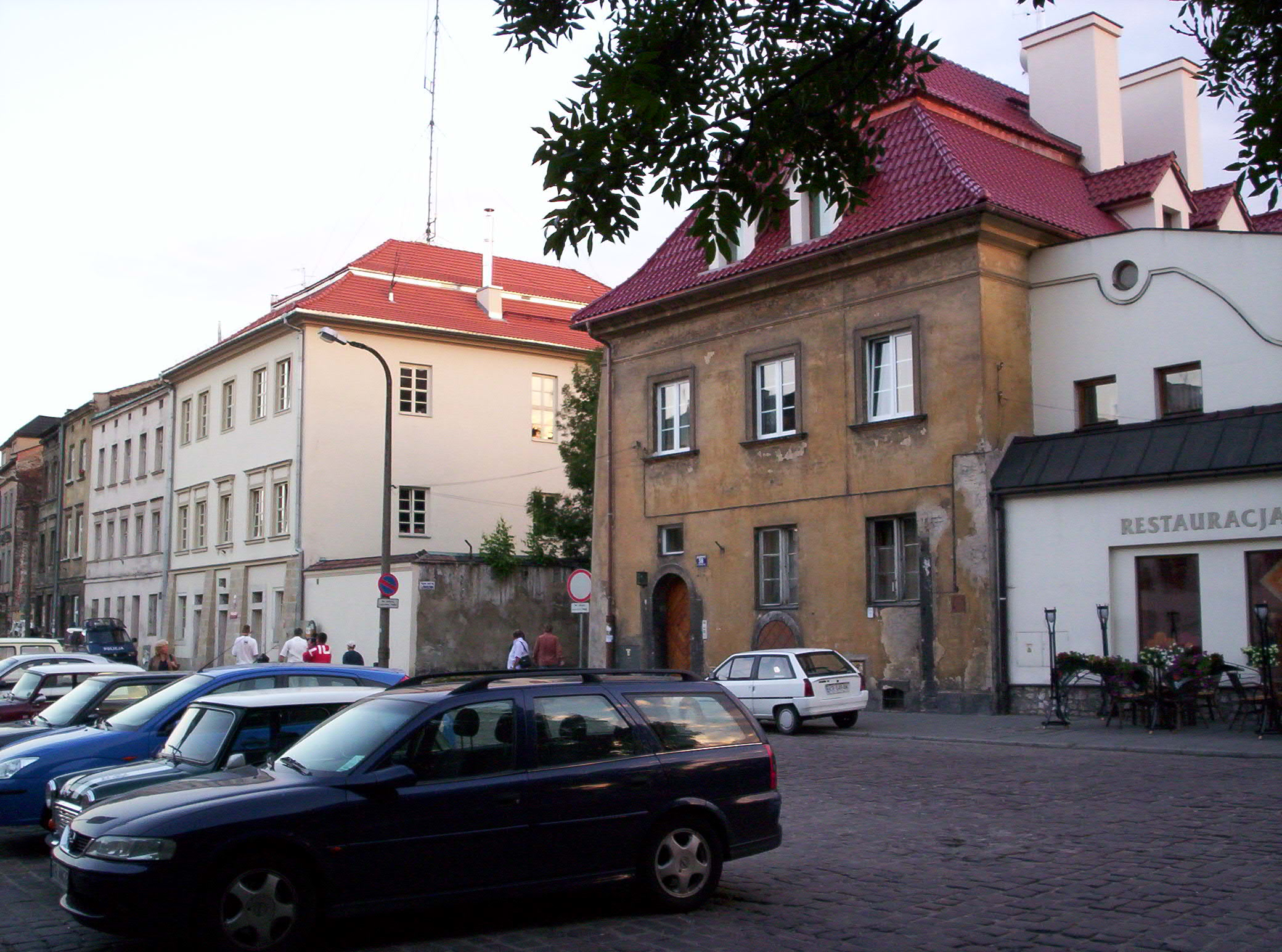 Widok na Żydowską dzielnicę Krakowa, Kazmierz / View of Jewish Krakow District, Kazimierz